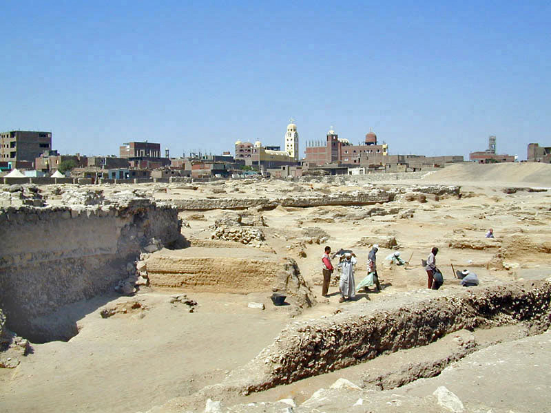 Le Caire : fouilles archéologiques dans le quartier d'El-Fostat du Caire La ville d'El Fostat (aujourd'hui un quartier du Caire) fut fondée par le général Amru ben al-As suite à la conquête de l'Égypte par les Arabes en 641. C'est là que la première mosquée du pays et de l'Afrique fut bâtie.